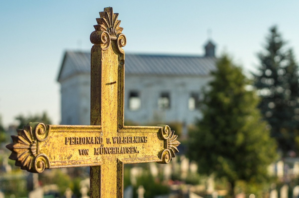 Глыбокае. Магіла Мюнхгаўзена